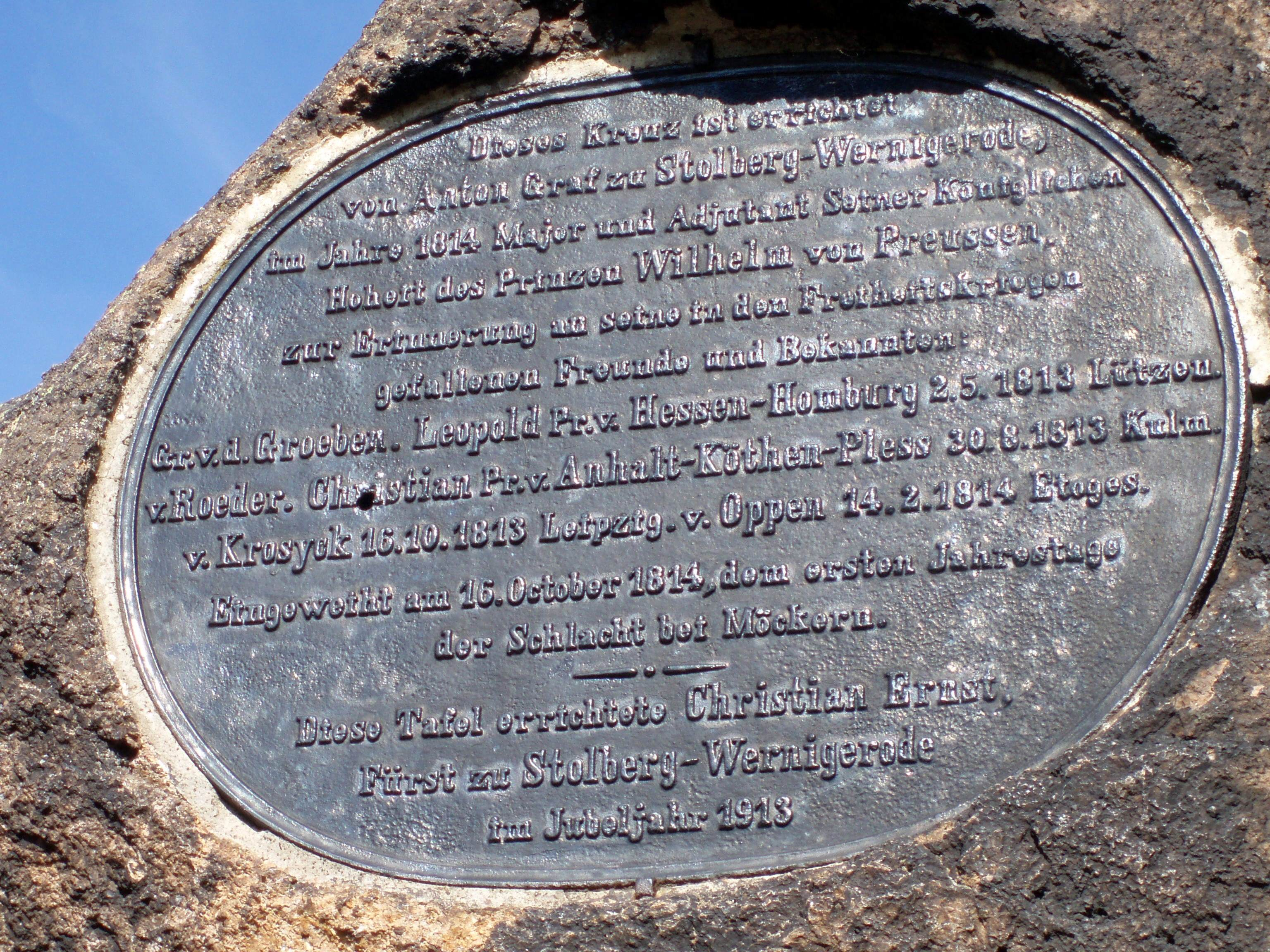 Tafel am Ilsestein